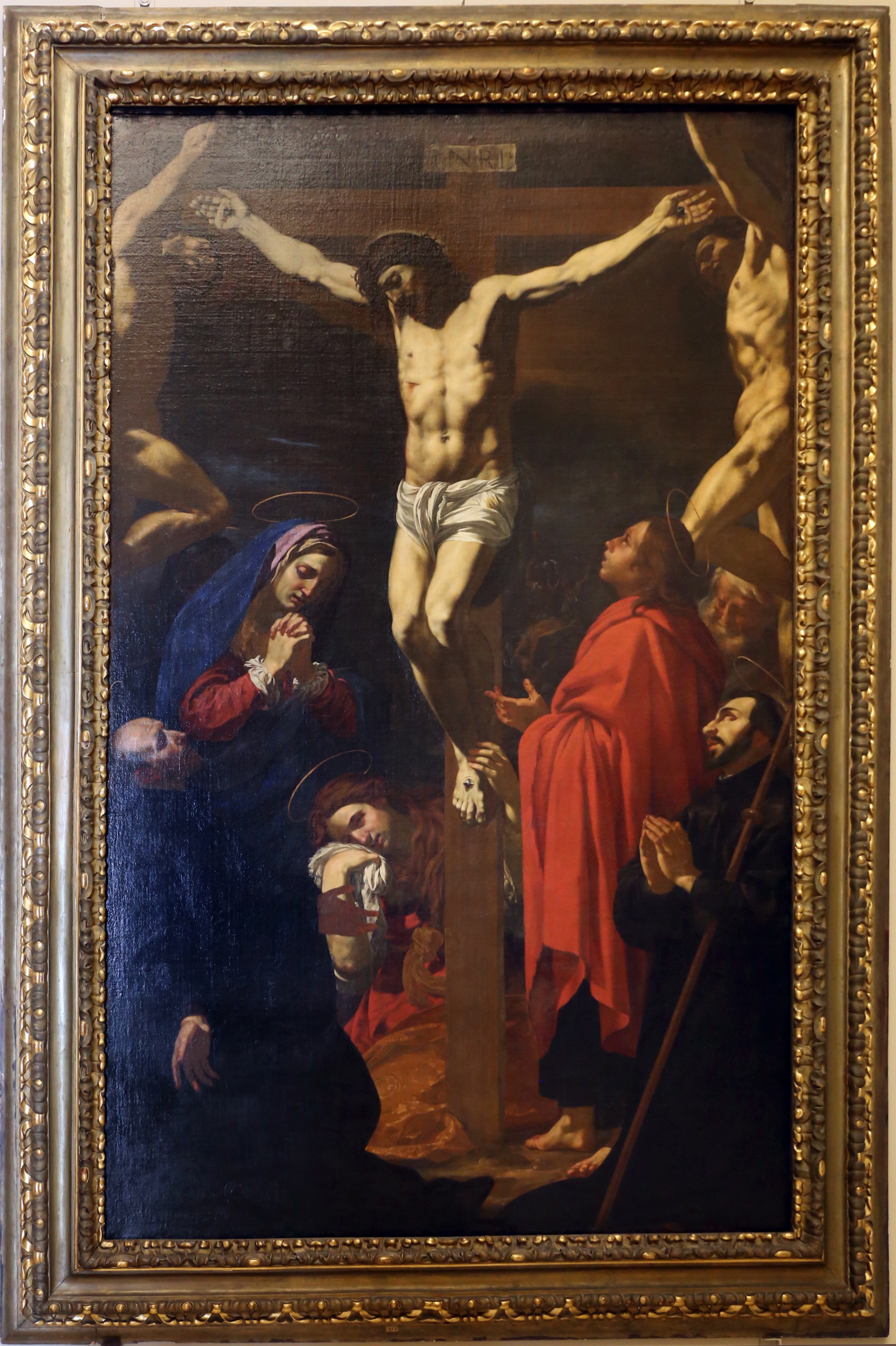 Palazzo dei Musei (Modena) This is a photo of a monument which is part of cultural heritage of Italy.